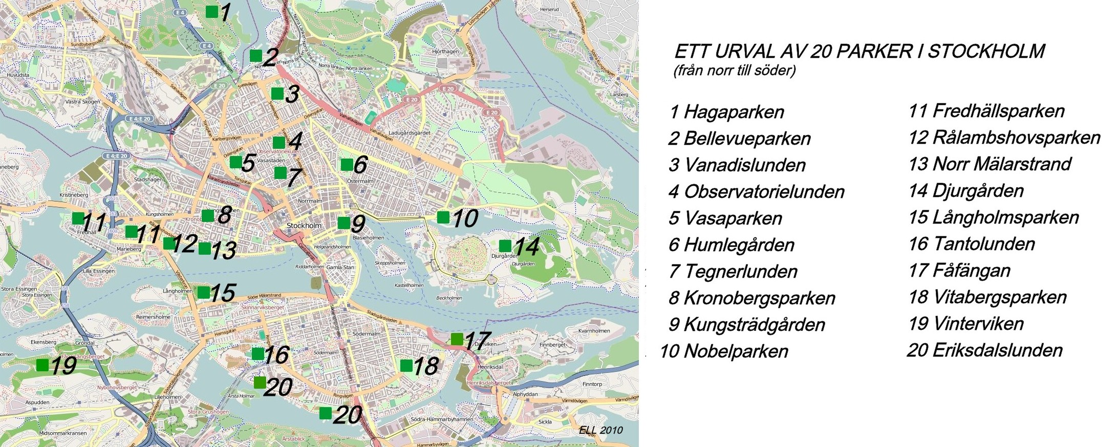 Ett urval av Stockholms parker